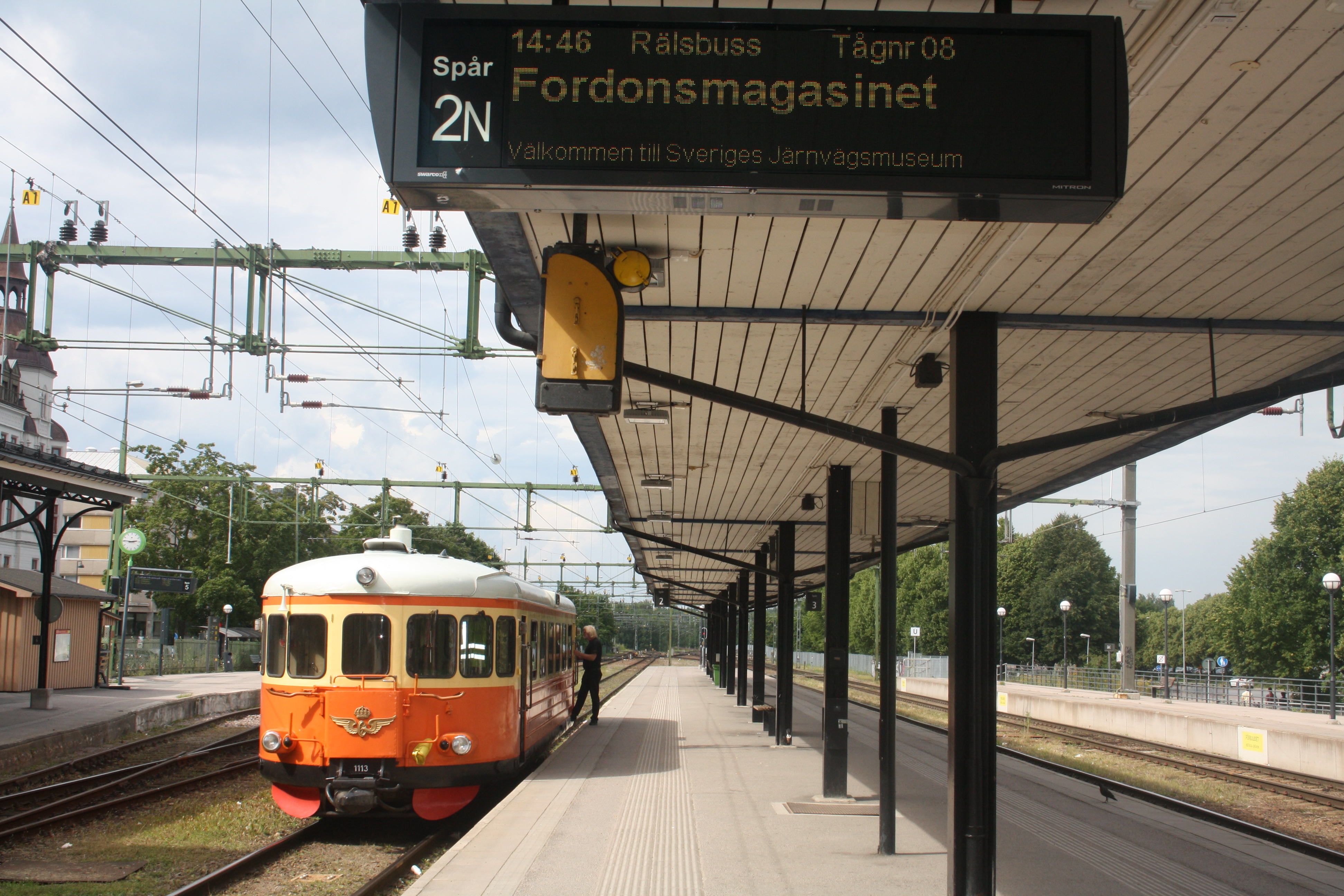 Perrongen i Gävle med Rälsbuss